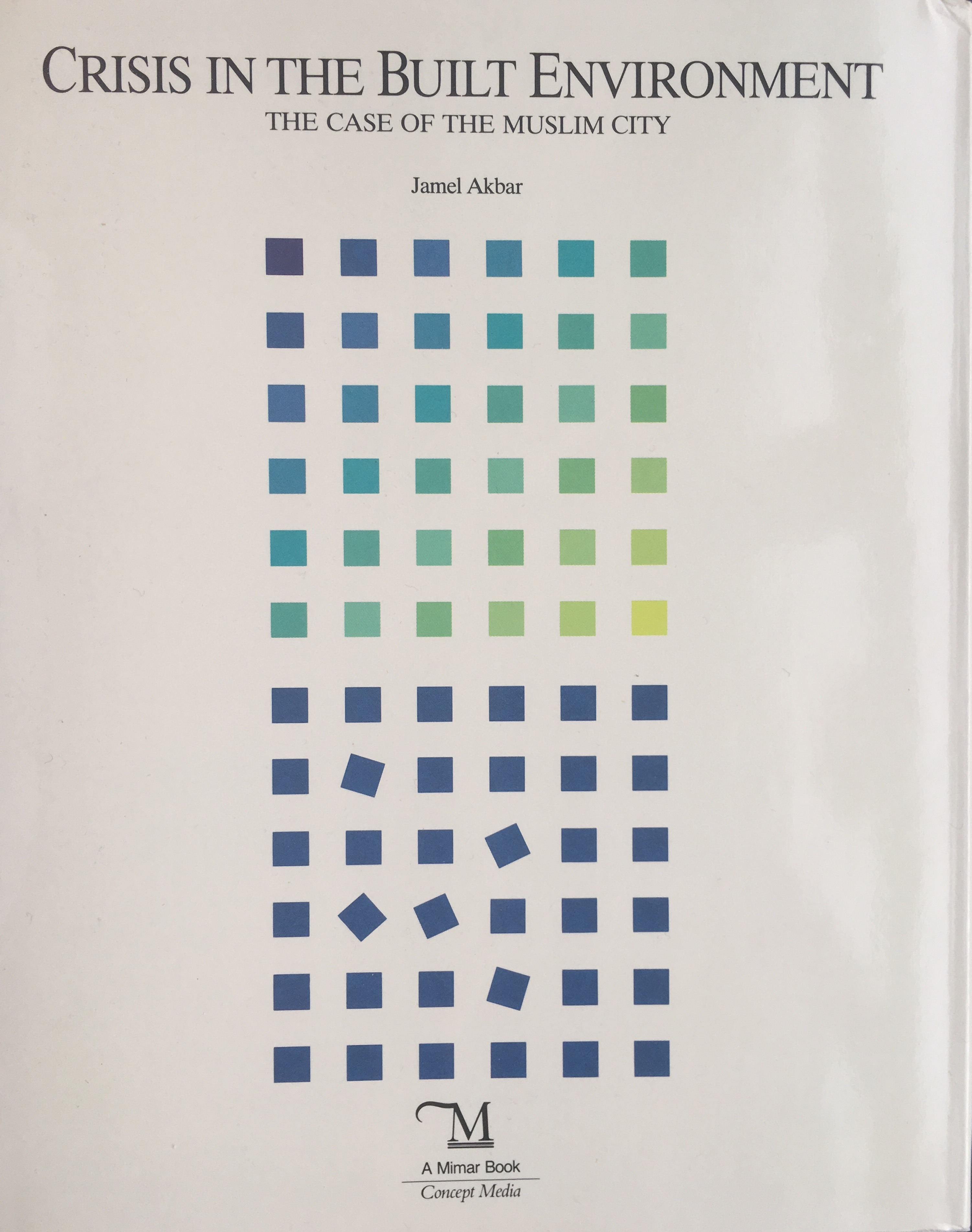 Crisis in the Built Environment The case of the Muslim city,1988